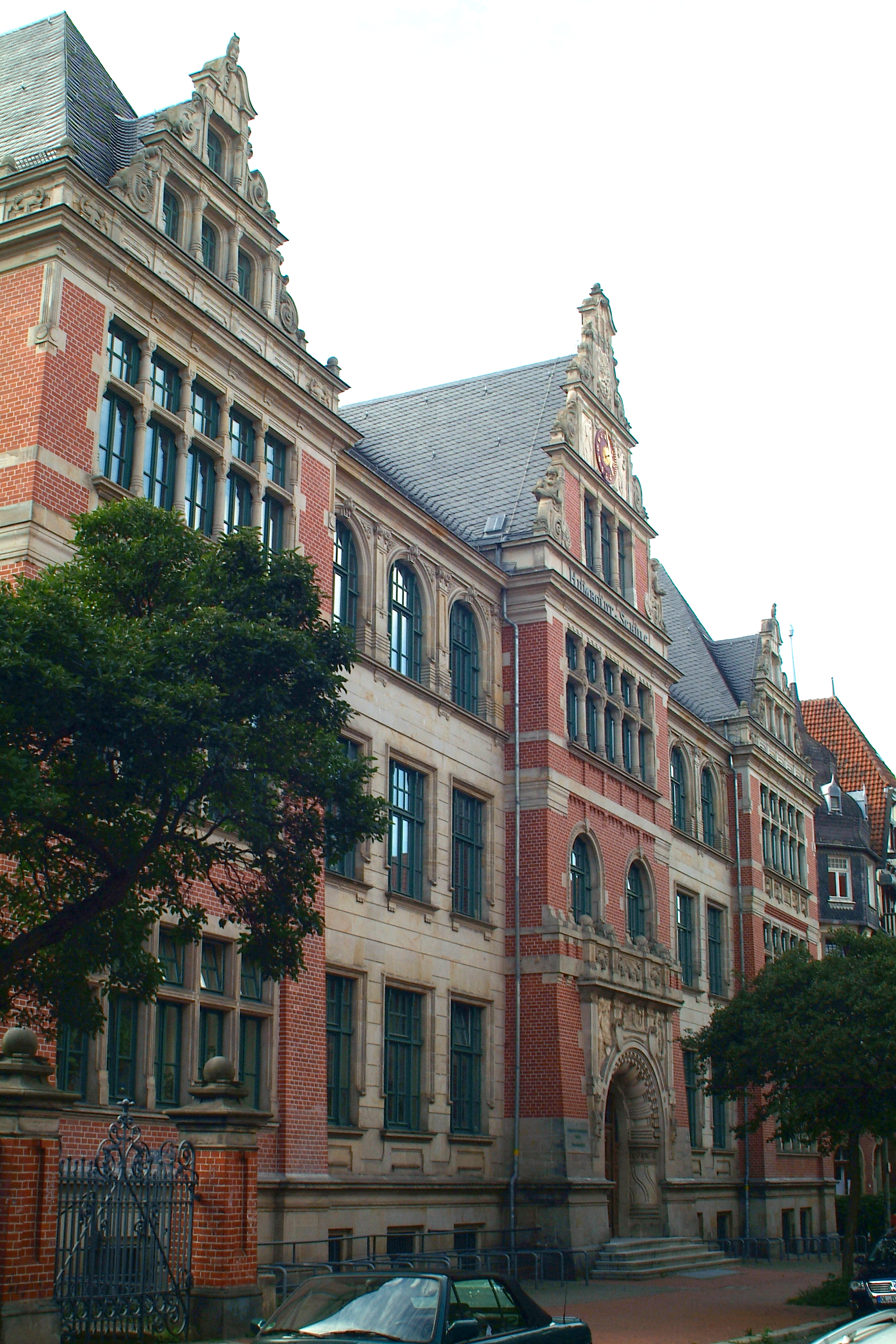 Beethovenstraße 5, Hannover-Linden, ehemalige Humboldtschule, jetzt IGS Linden Sekundarstufe II; Architekt war Georg Fröhlich ...